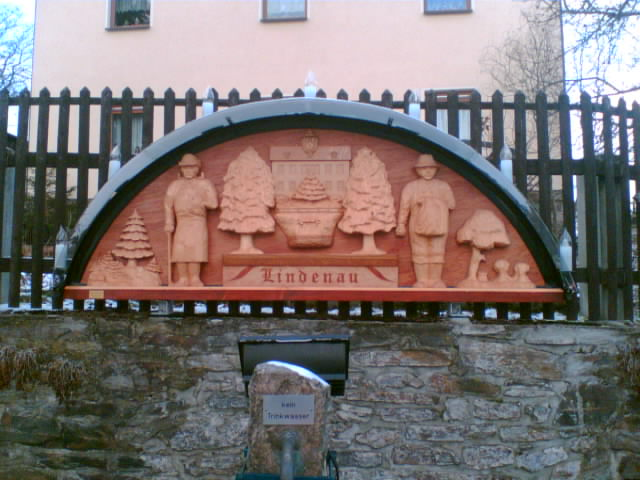 Der Lindenauer Schwibbogen - Lindenaus Wahrzeichen zur Weihnachtszeit